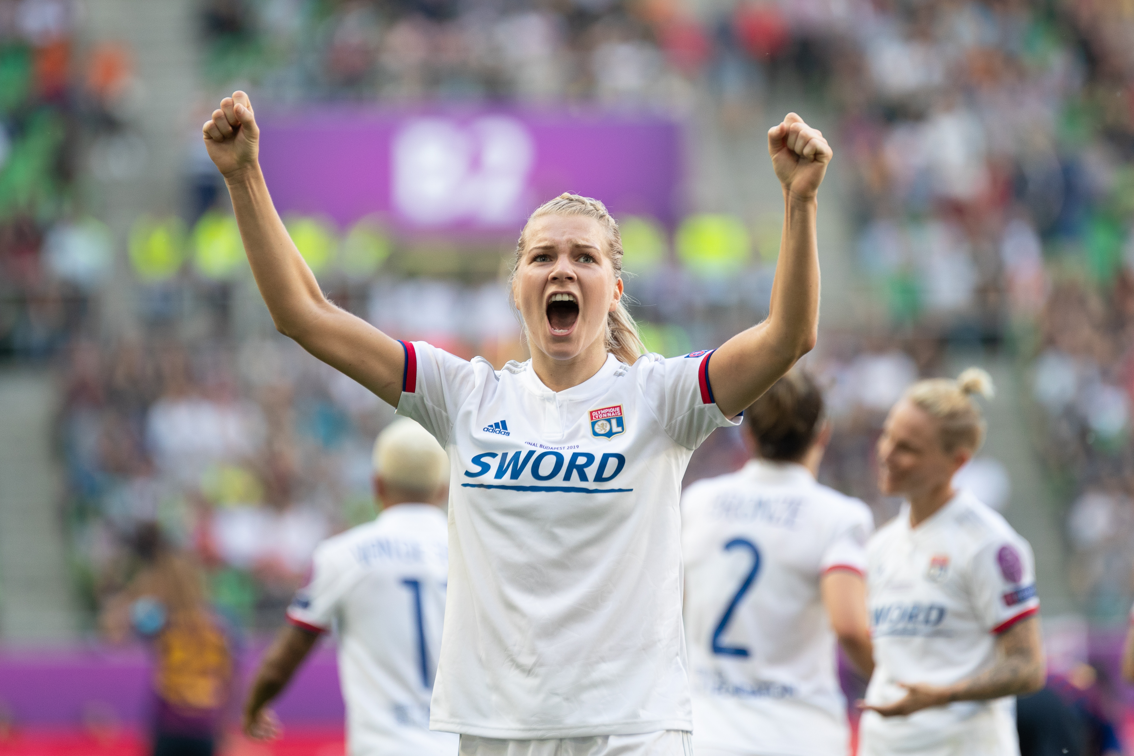 Fußball, Frauen, UEFA Women's Champions League, Olympique Lyonnais - FC Barcelona; Ada Hegerberg (Olympique Lyon,14) feiert ihr drittes Tor zum 0:4; Jubel, celebration; Tor, goal, Torerfolg, Aktion